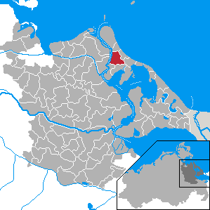 Mölschow, Landkreis Ostvorpommern, Mecklenburg-Vorpommern